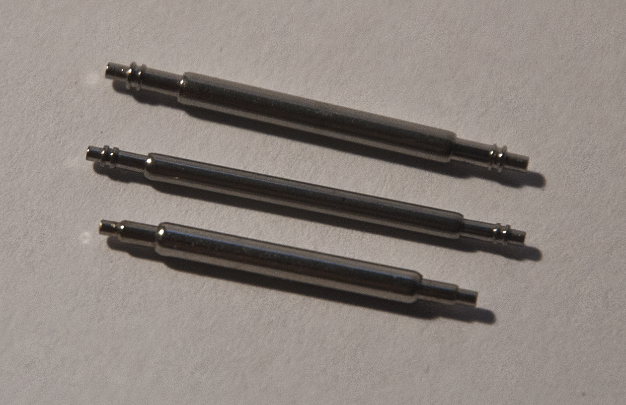 Drei verschiedene Federstege